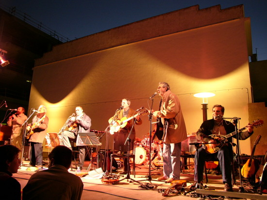 valencian folk ensemble Al Tall performing live in Benissa